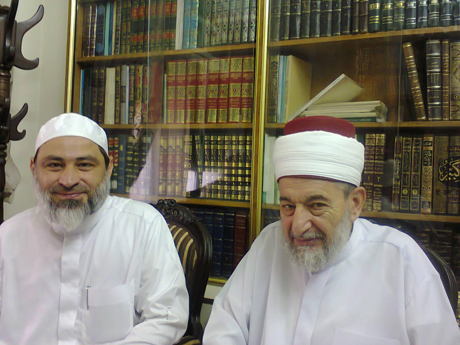 الدكتور نور الدين عتر والشيخ محمد مجير الخطيب Авар: Доктор Нуруддин ГІитр ва шайих МухІаммад Мужир ал-ХатІиб